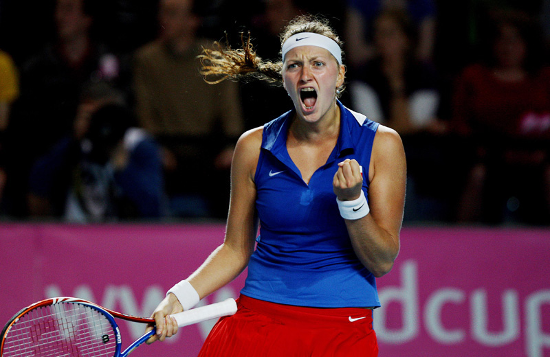 Česká tenistka Petra Kvitová ve finále Fed Cupu 2011, kde vyhrála obě dvouhry; listopad, Olympijský stadion, Moskva